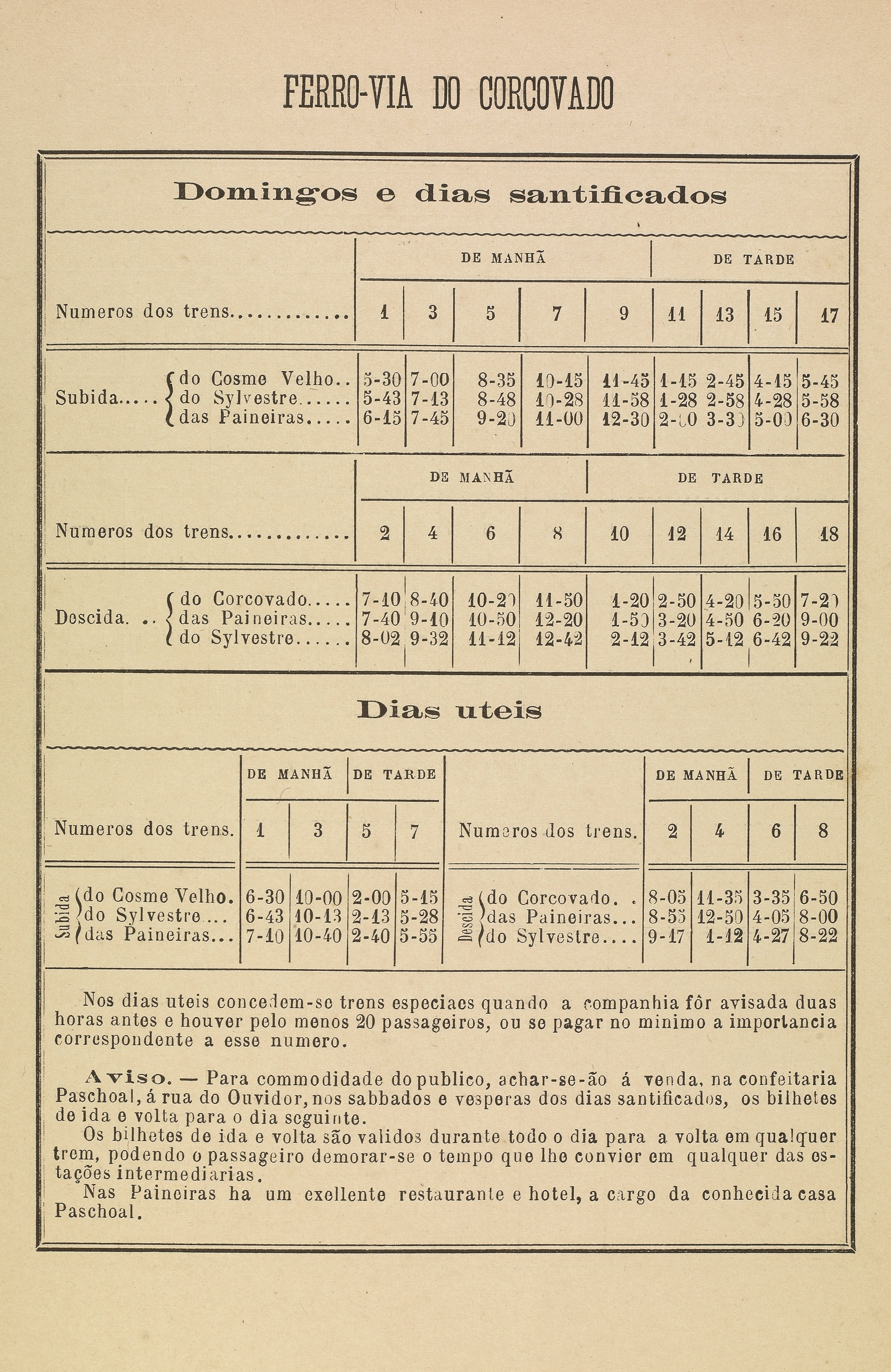 Horários dos trens da Ferrovia do Corcovado. Arquivado em: Biblioteca Maria Beatriz Nascimento, Arquivo Nacional